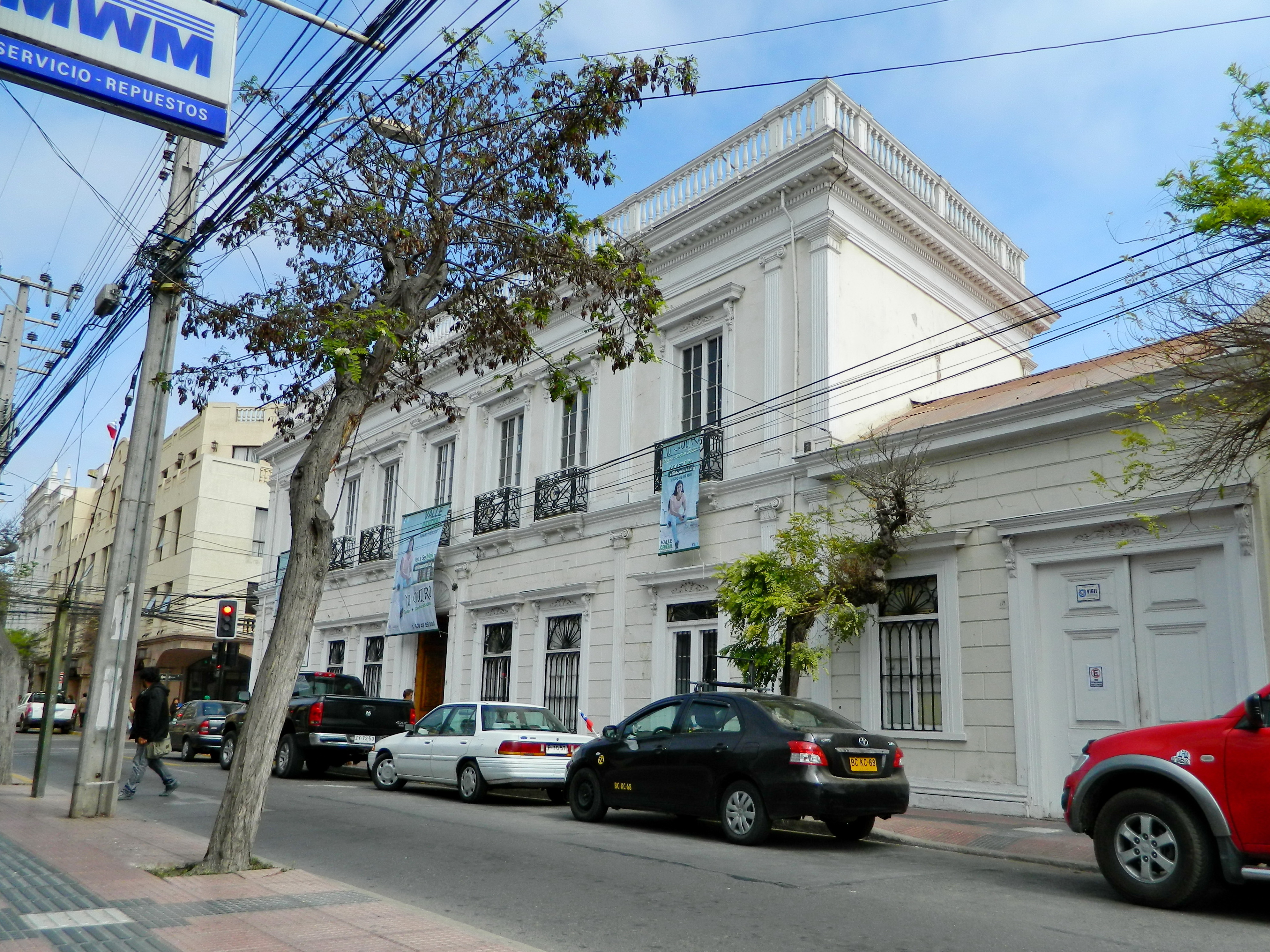 Casa Chadwick This is a photo of a national monument in Chile: 348